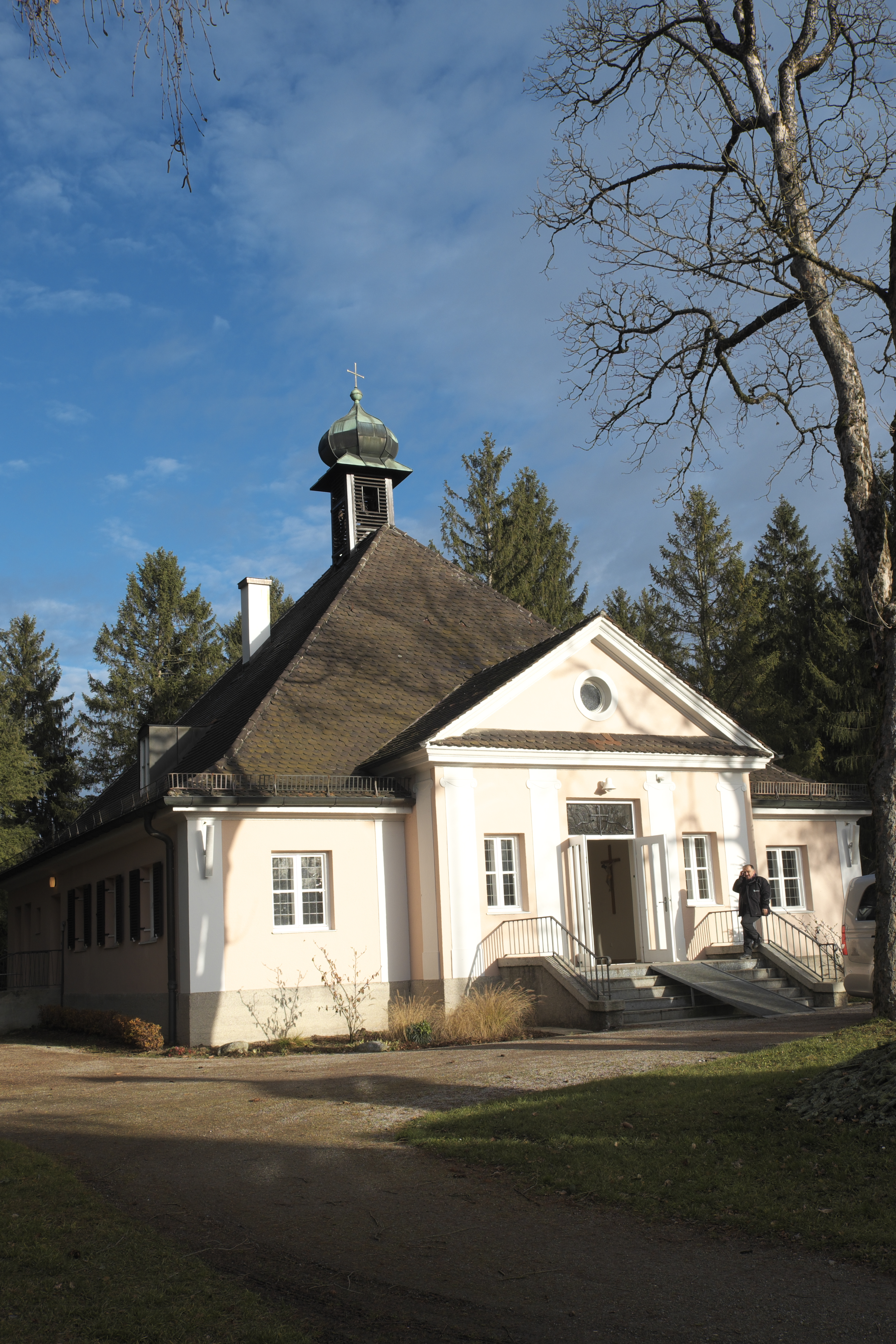 Waldfriedhof Obermenzing in Obermenzing im Stadtbezirk Pasing-Obermenzing in München (Bayern/Deutschland)